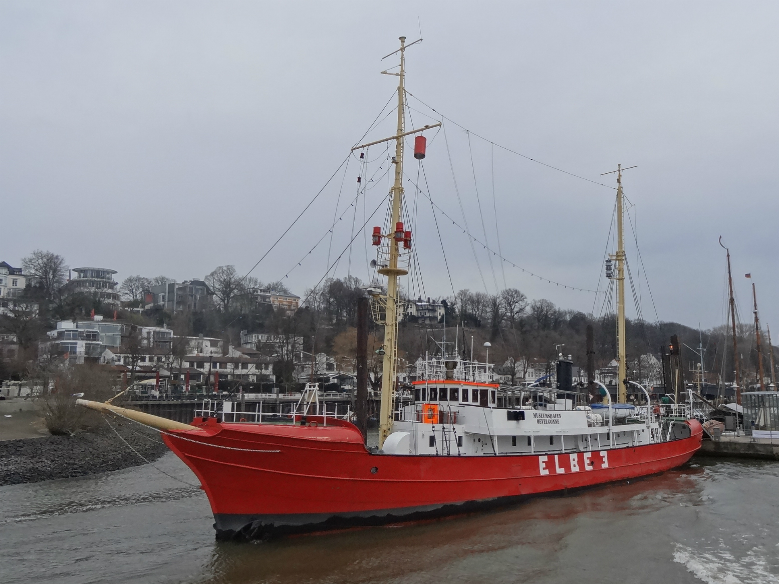 ELBE3